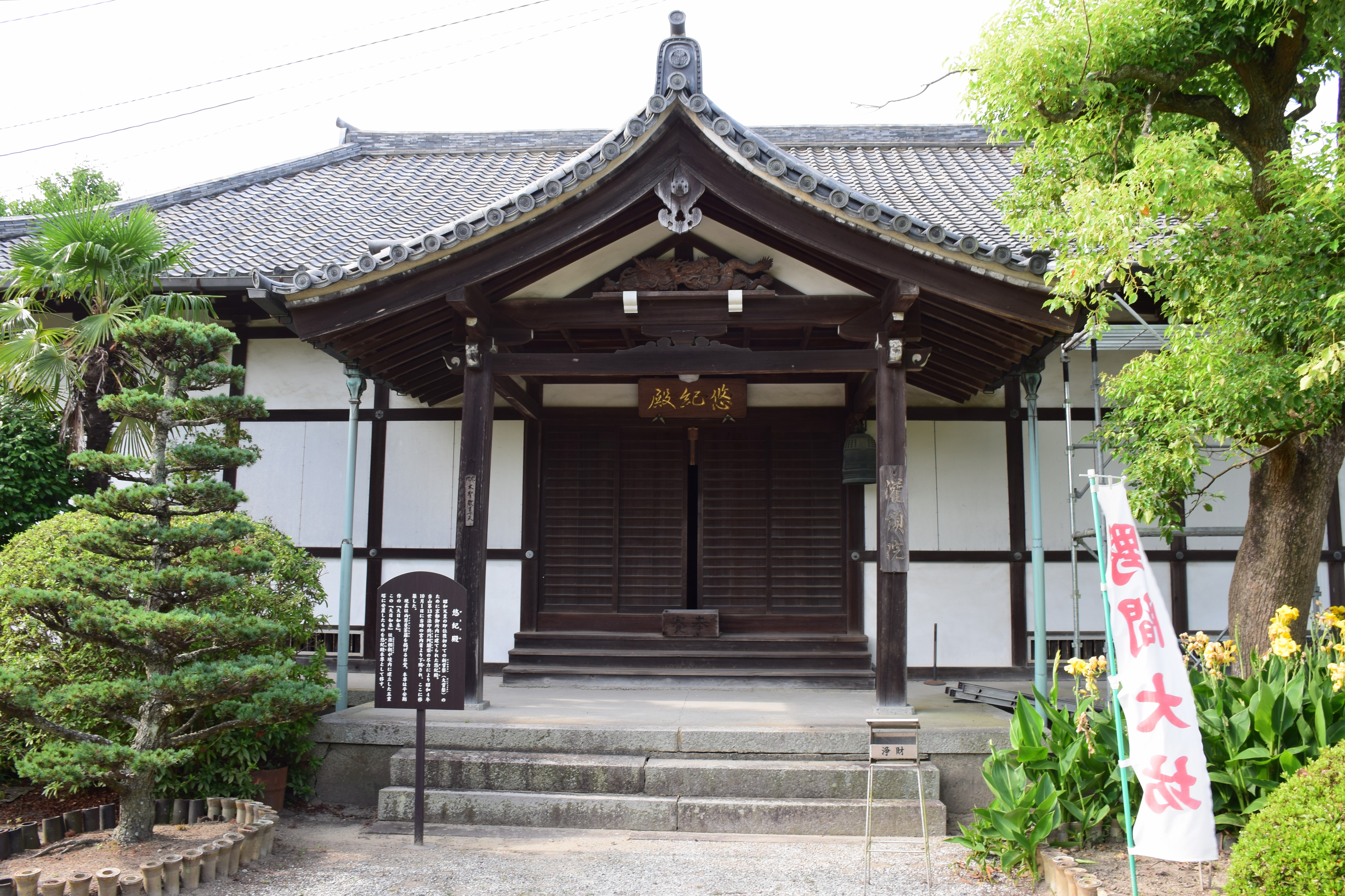 野間大坊の境内にある悠紀殿